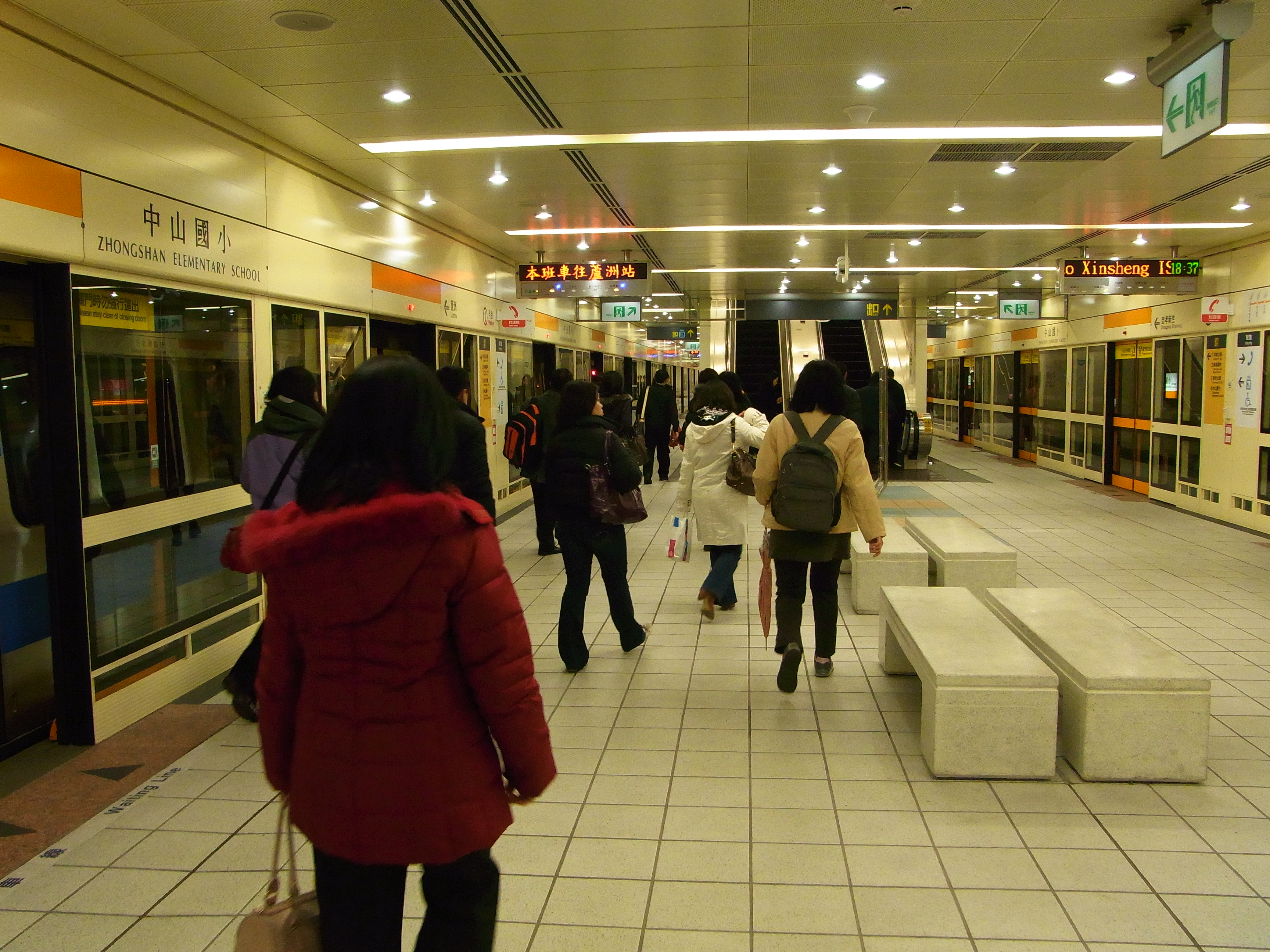 台北捷運中山國小站月台